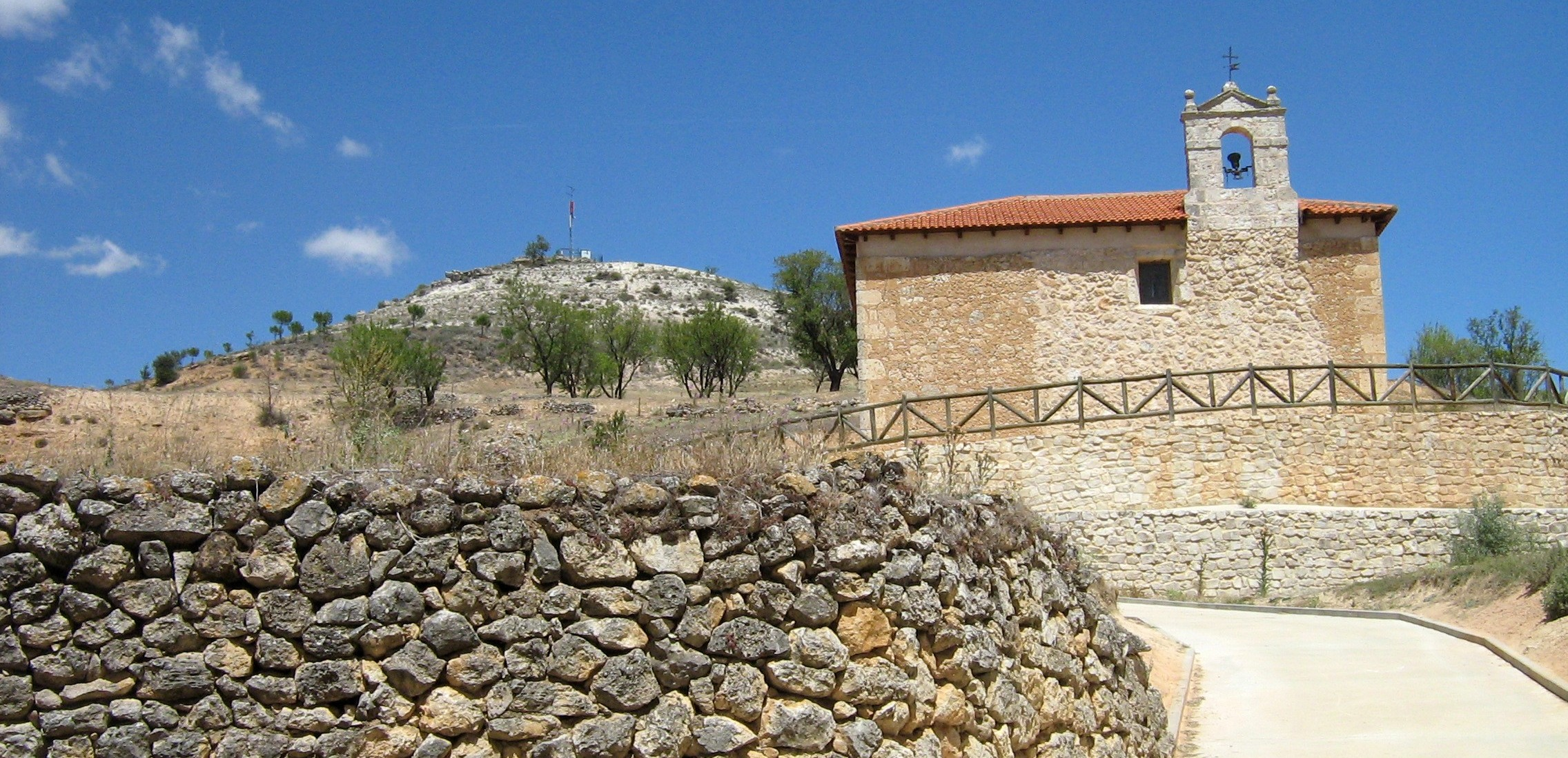 Corrales de Duero. Ermita San Antonio